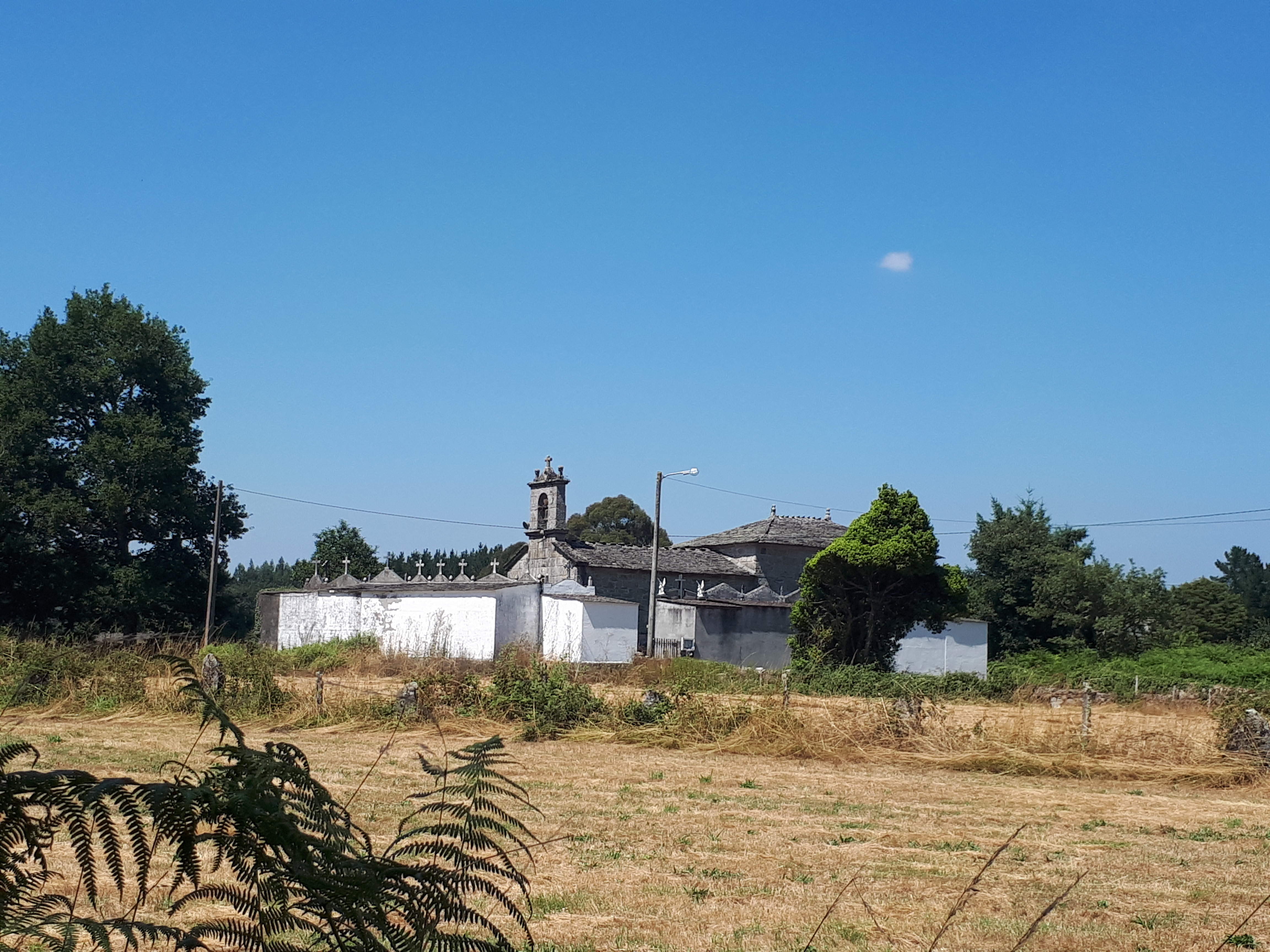 Igrexa parroquial de Piñeiro ( O Corgo)